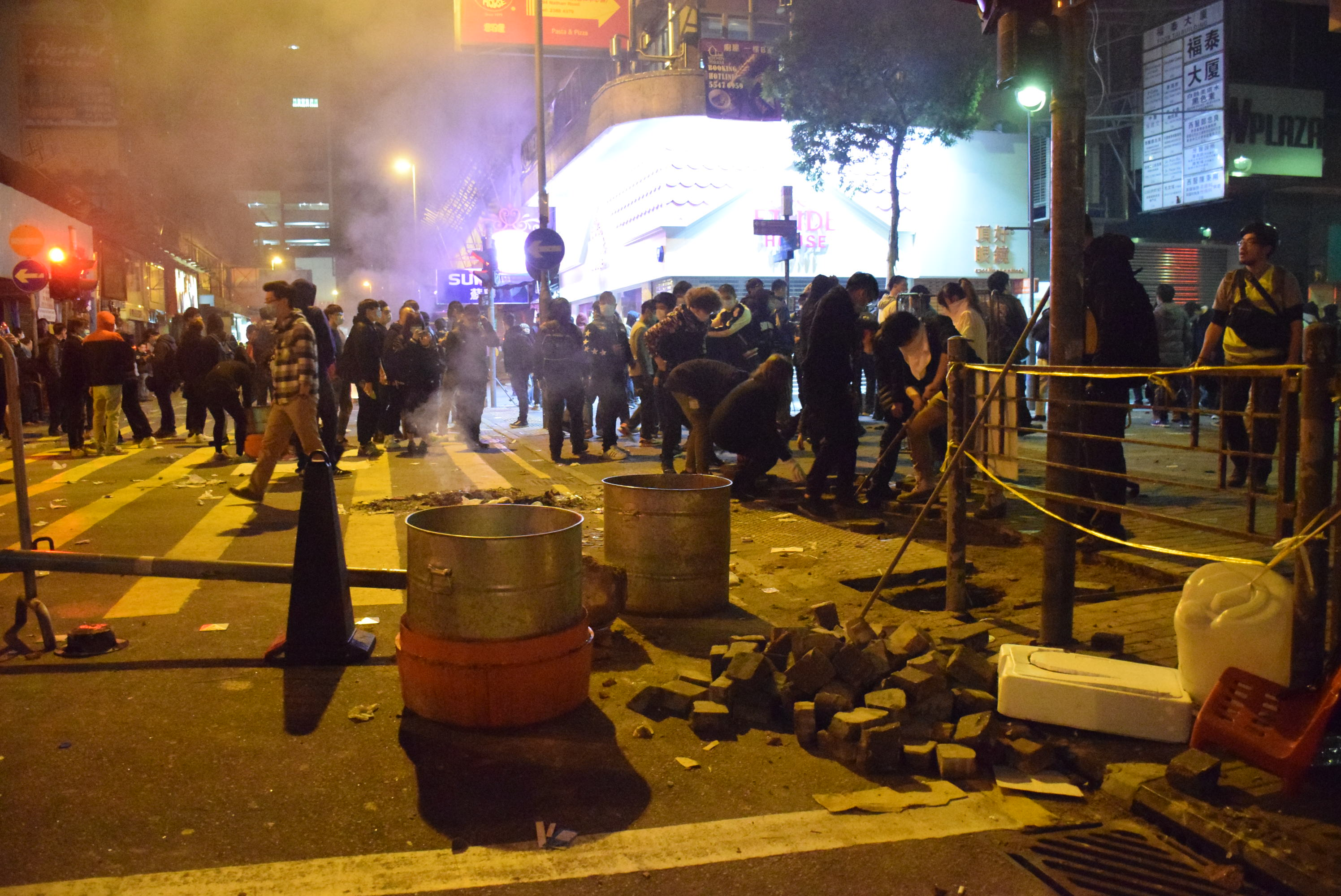 有示威者用鐵枝撬起行人路的磚塊